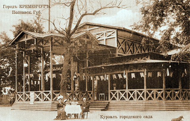 Postcards of old Kremenchuk. Курзал у міському парку.